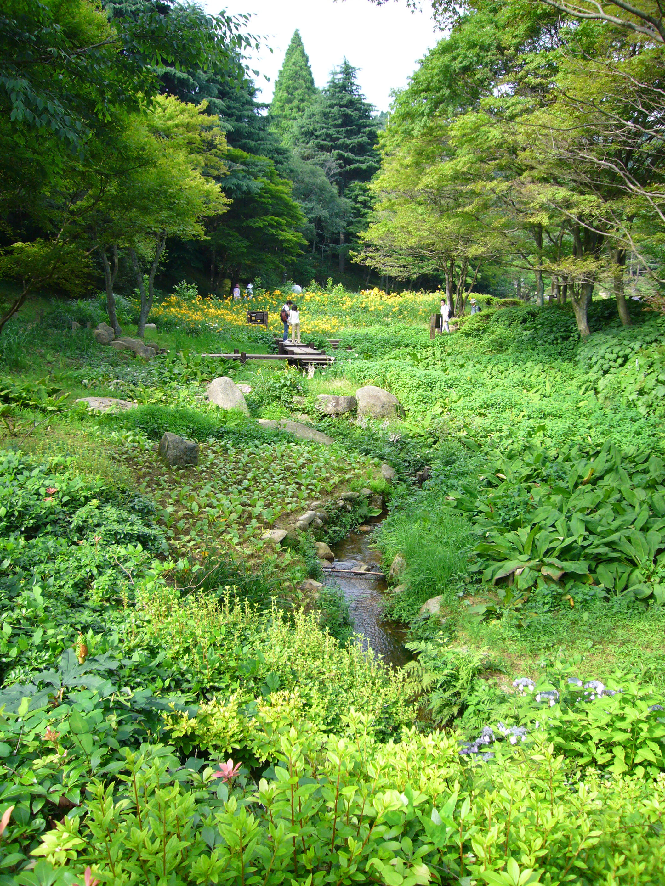 Rokko Alpine Botanical Garden in Kobe, Hyogo prefecture, Japan